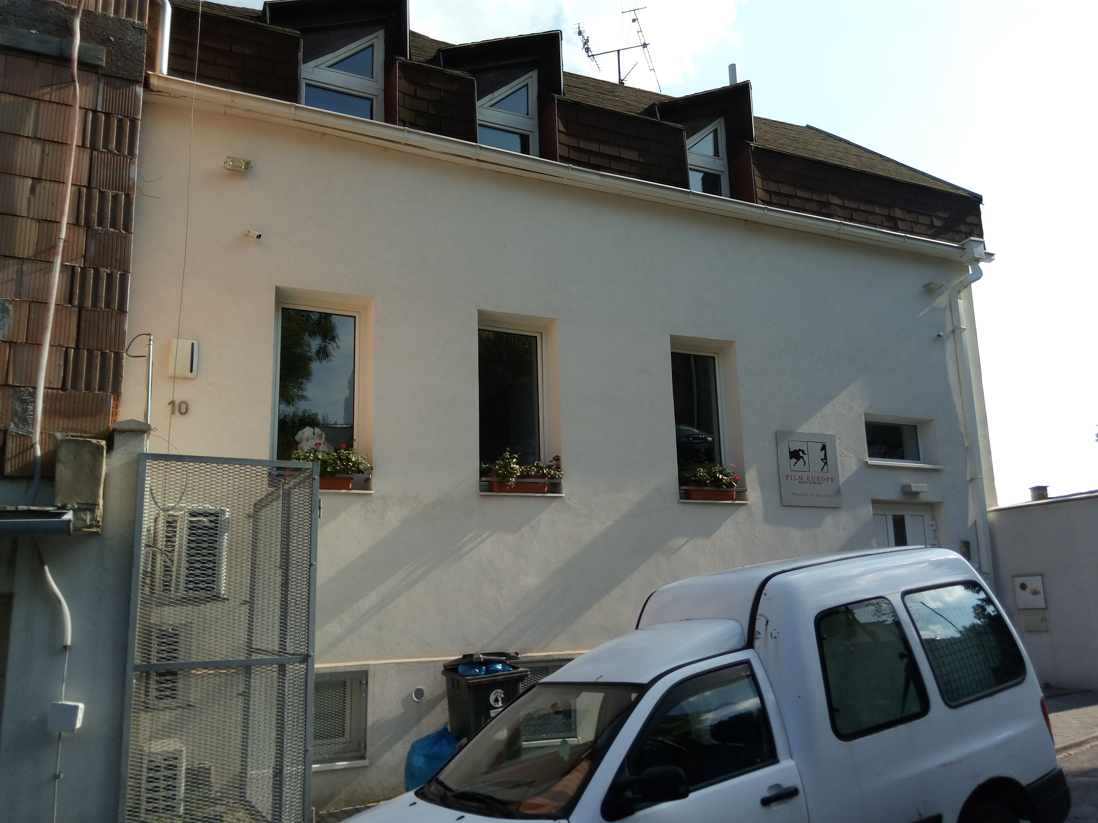 Matúškova 10, Nové Mesto, Bratislava